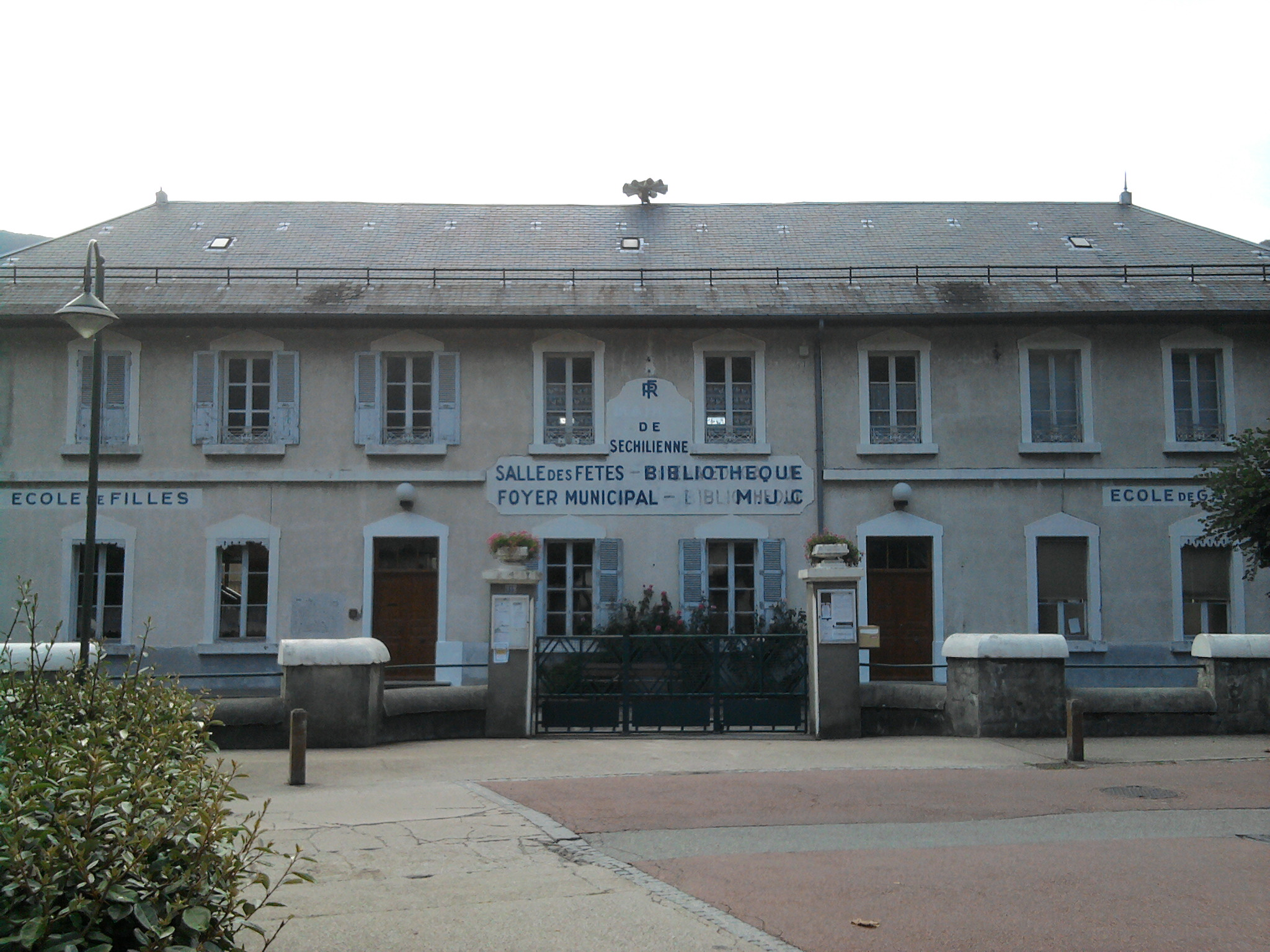 Ecole de Séchilienne